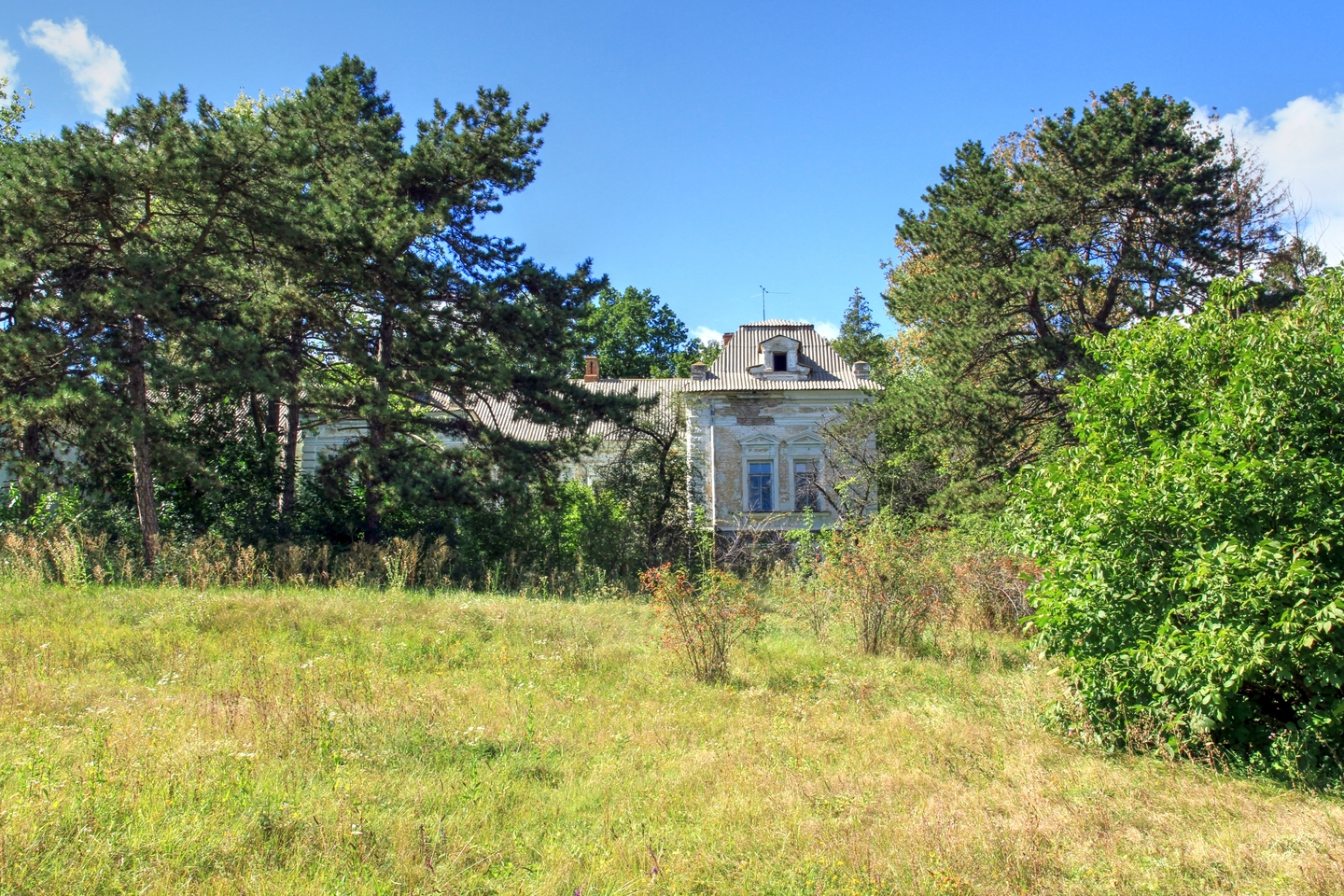 Столниченский парк, монумент природы, находится в Единецкий район, с. Столничень (код MD-ED-map-015)